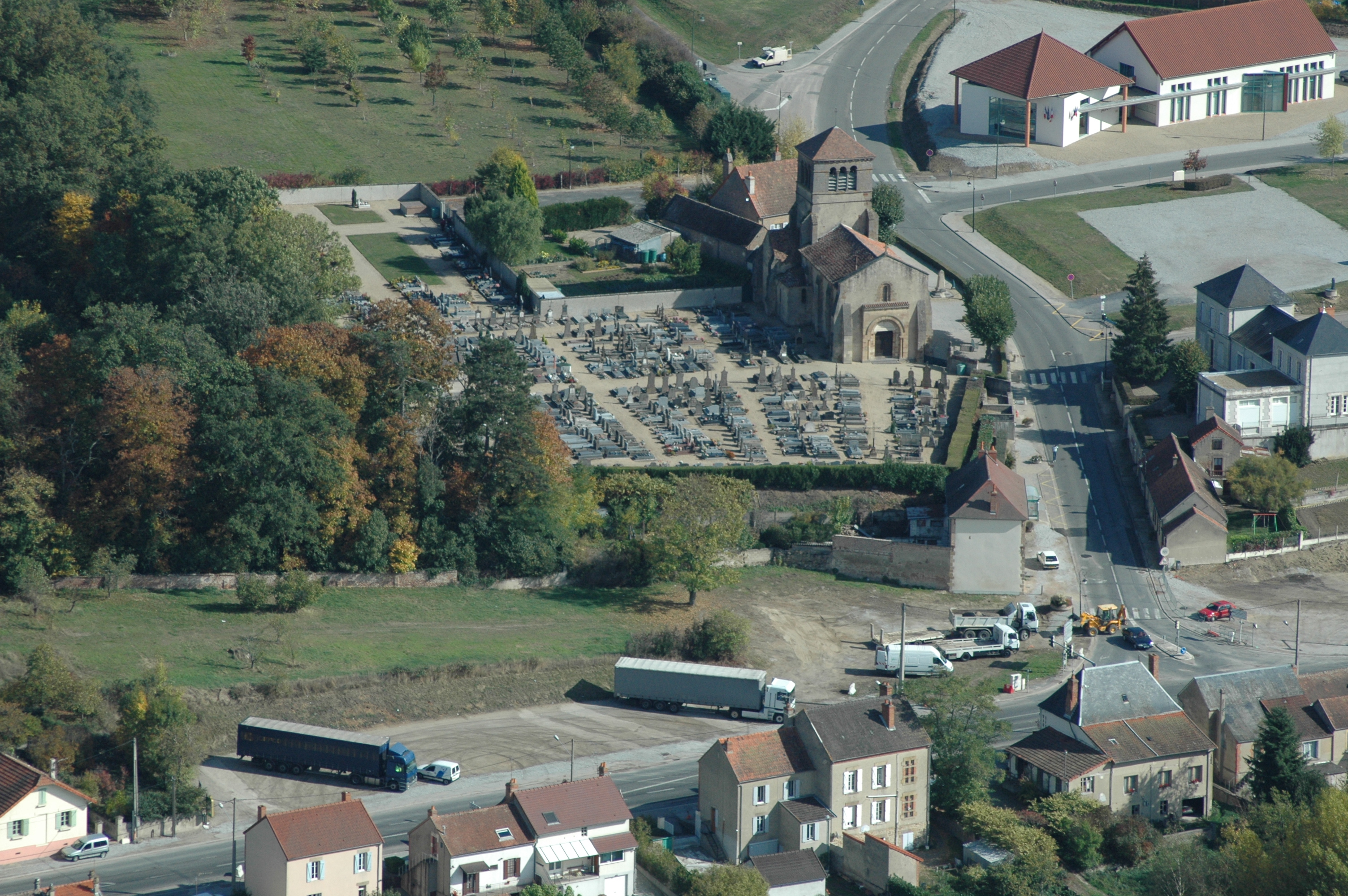 Vue sur Toulon-sur-Allier : son église, et son espaces publics.